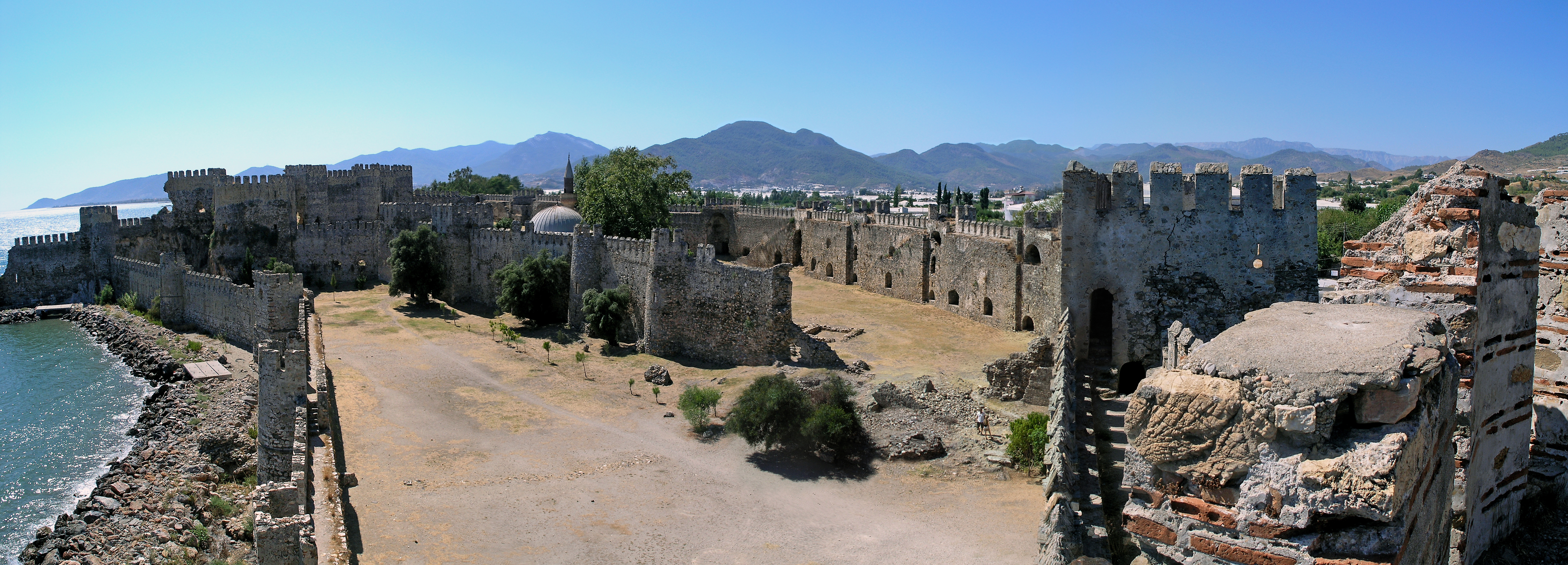 Турция, Анамур – Крепость Мамуре